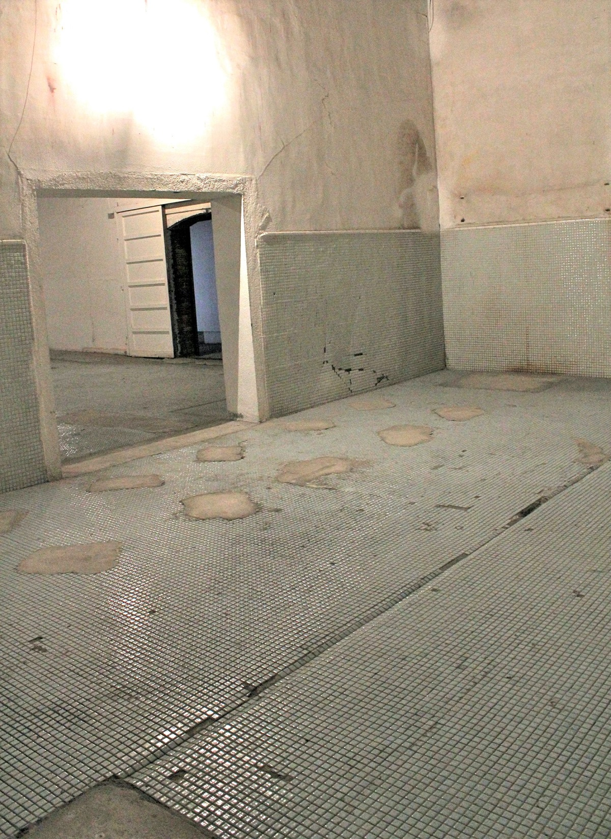 吉野町煉瓦倉庫内部、2016年6月27日撮影